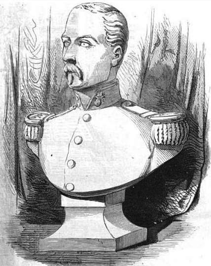 Le général Damesme.